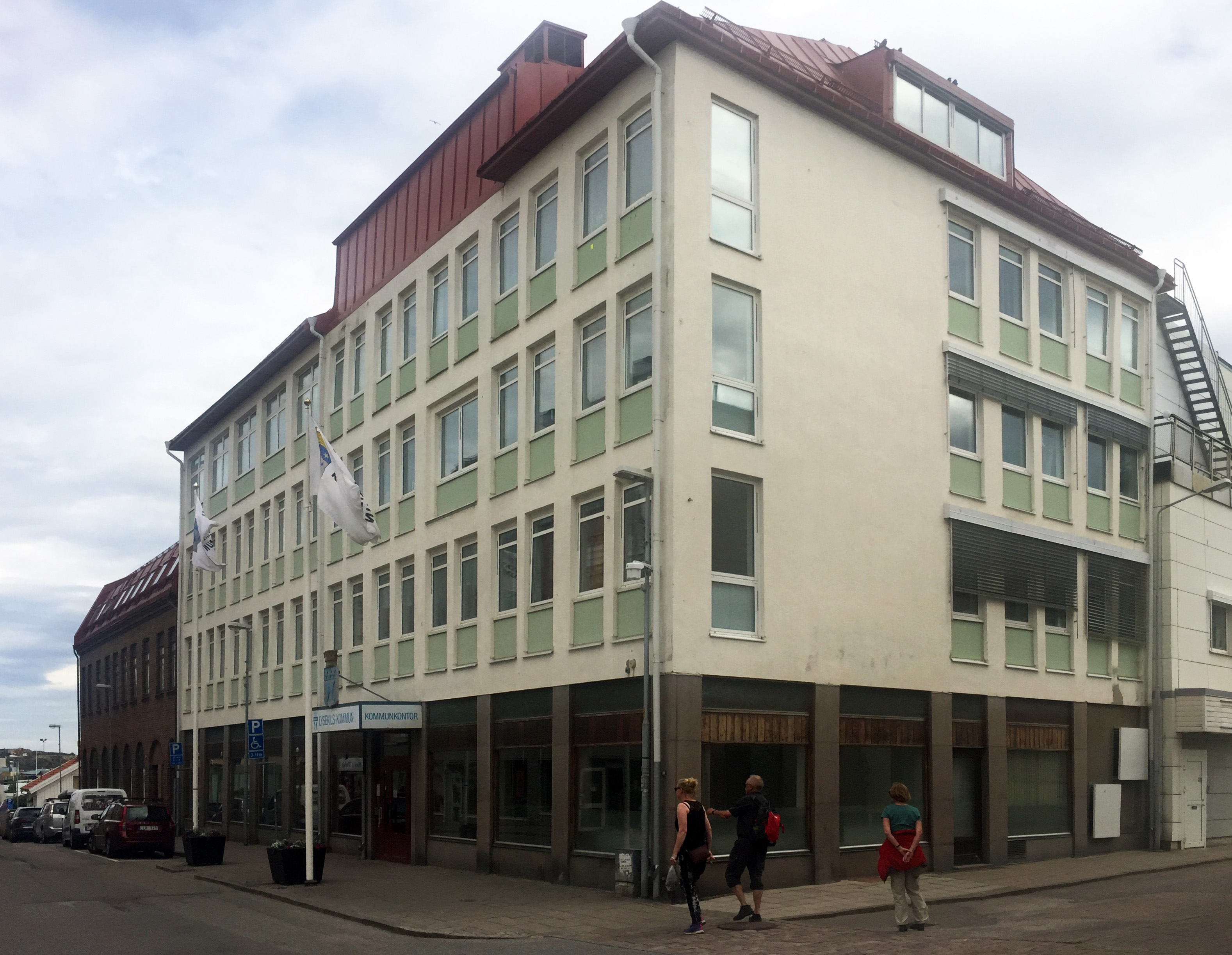 Lysekils kommunhus, Kungsgatan 44. Byggnadsår 1954. Byggmästare Nils Hansson. Arkitekt Per-Olof Olsson